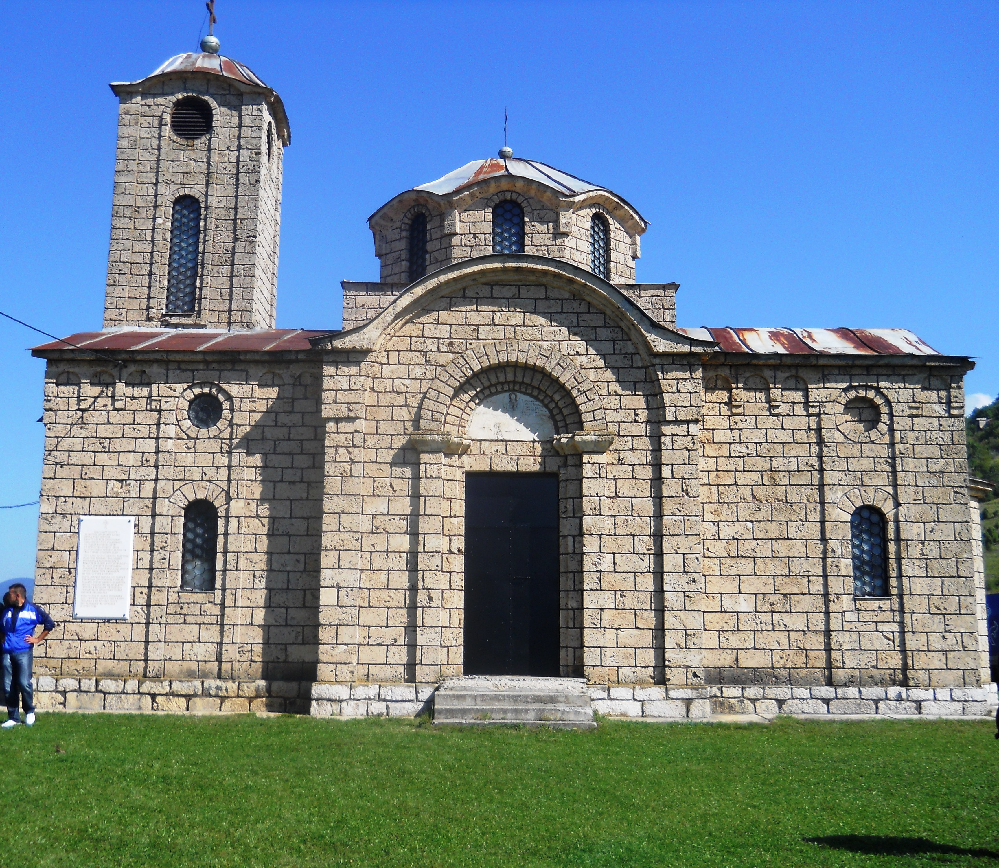 Манастир Кнежевина